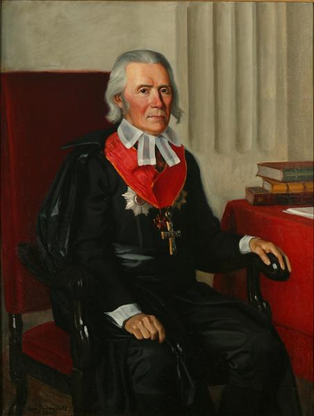 Архиепископ Турку Якоб Тенгстрём